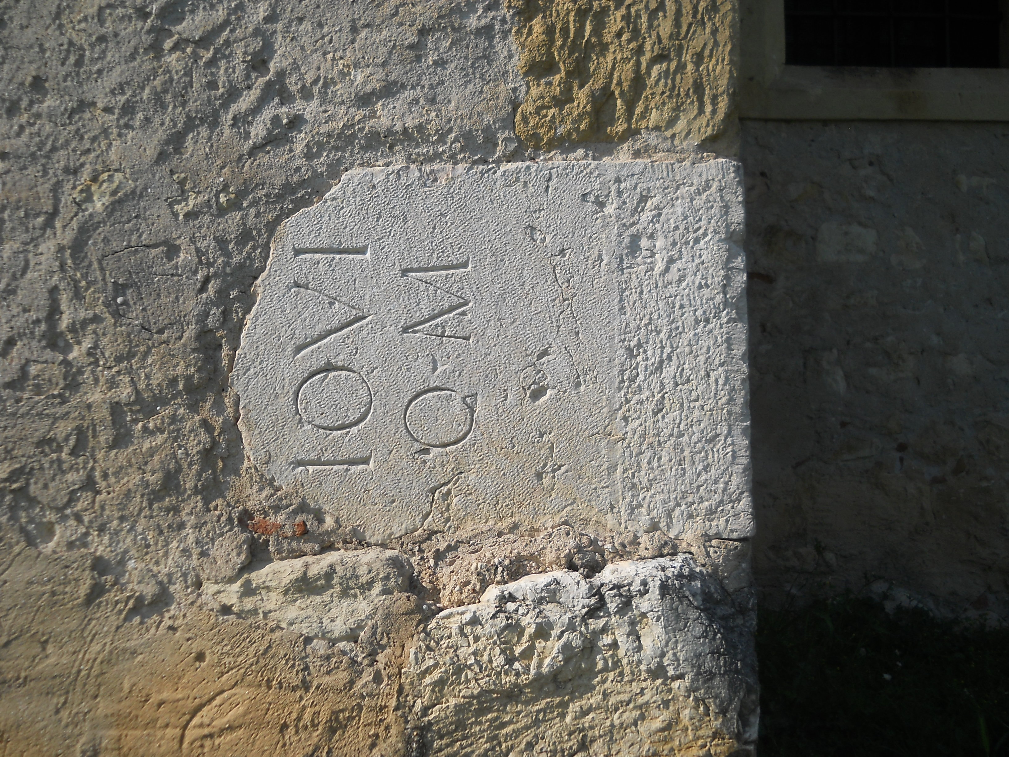 Chiesa romanica di San Marco al Pozzo a Valgatara (frazione di Marano di Valpolicella). Pietra risalente all'epoca romana con incisa una invocazione al dio Giove utilizzata come materiale di costruzione e collocata nel lato meridionale della chiesa.